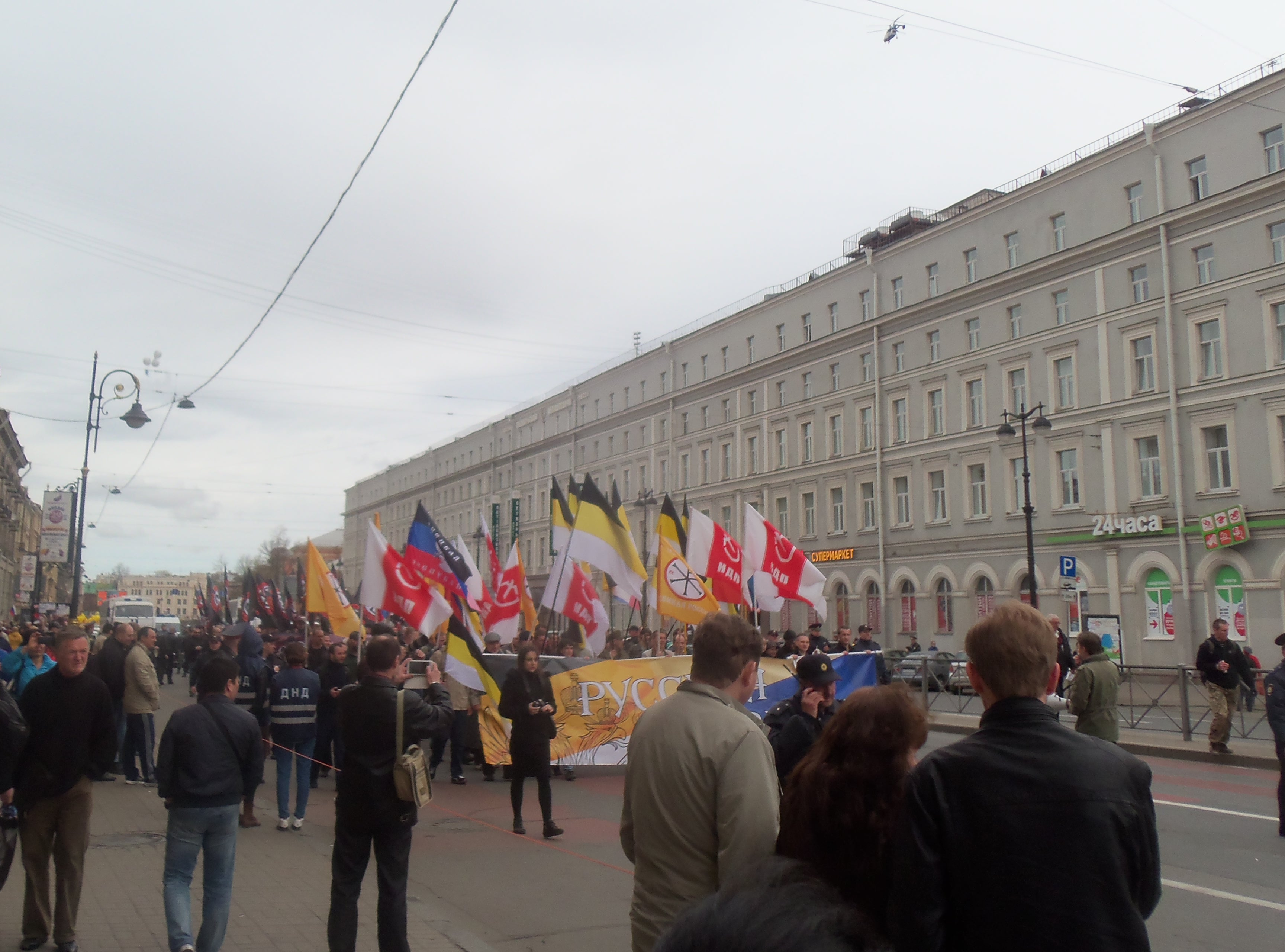 Колонна националистов идёт по Лиговскому пр. на первомайском шествии в Петербурге